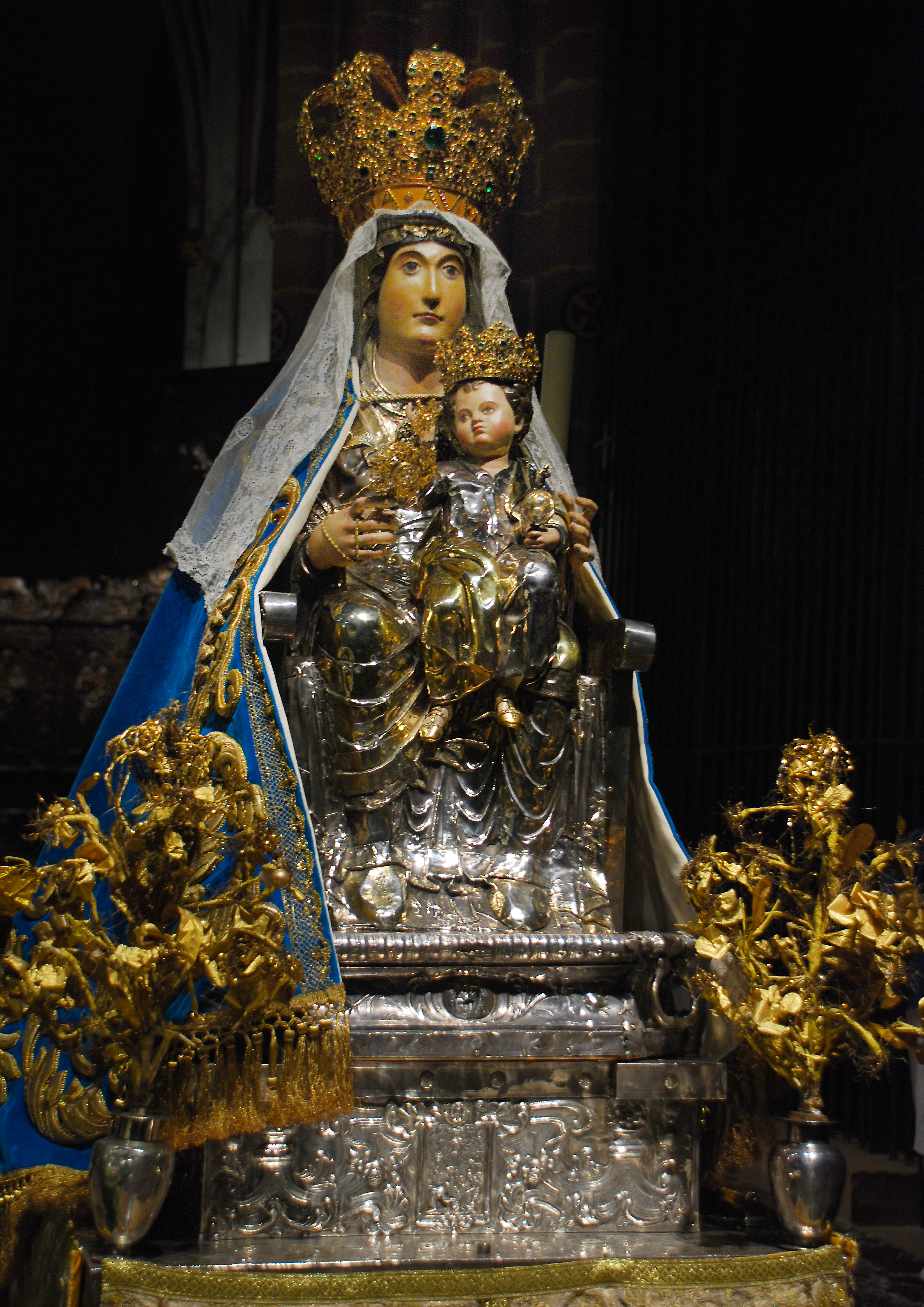 Santa María la Real de Pamplona vestida para un oficio religioso